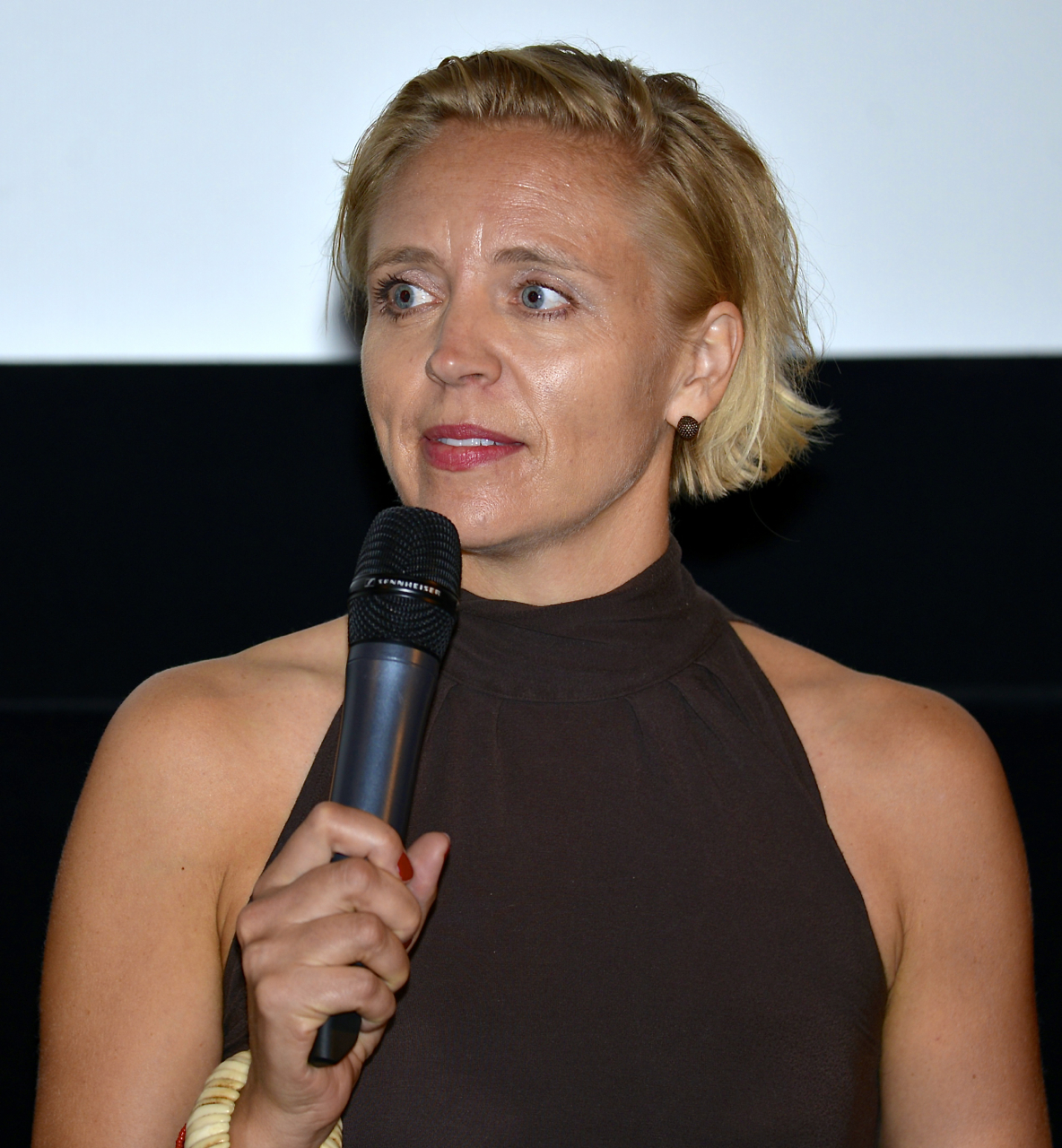 Elisabet Gustafsson under presentationen av den Svenska filmhösten 2014 i Filmhuset i Stockholm den 18 augusti 2014.